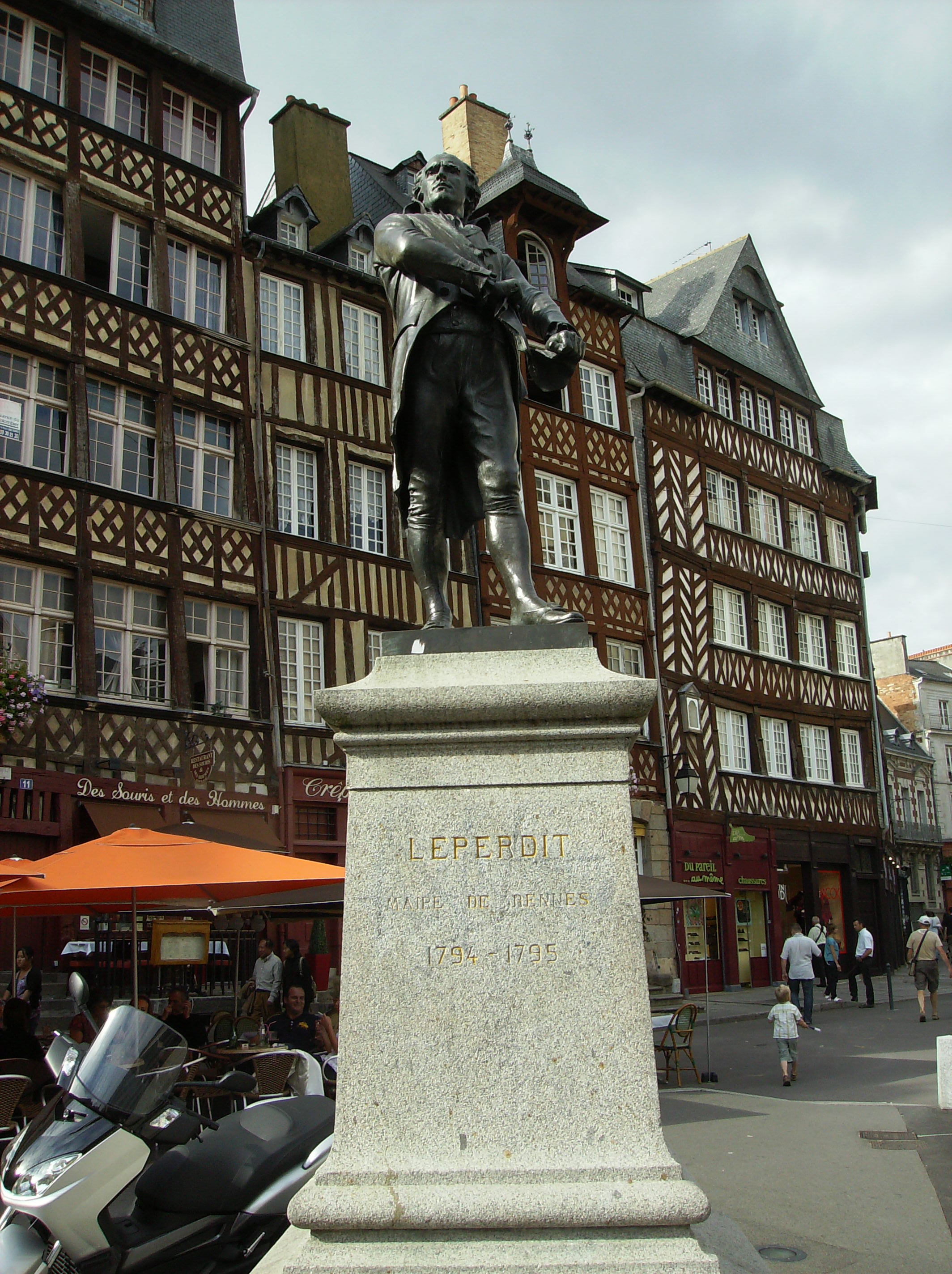 Statue en bronze Emmanuel Dolivet représentant de Jean Leperdit (1752 - 1823) déchirant une liste de conscription. Place du Champ-Jacquet à Rennes.